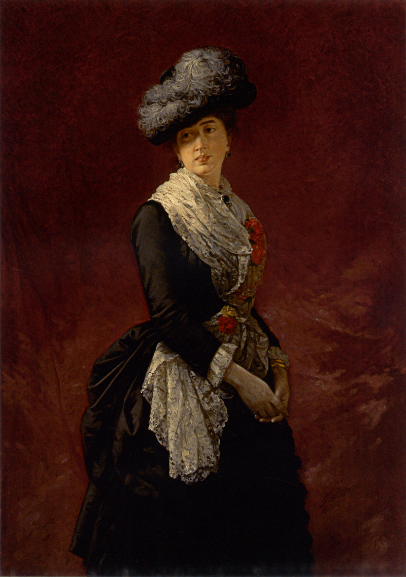 Portrait of Cecilia de Madrazo